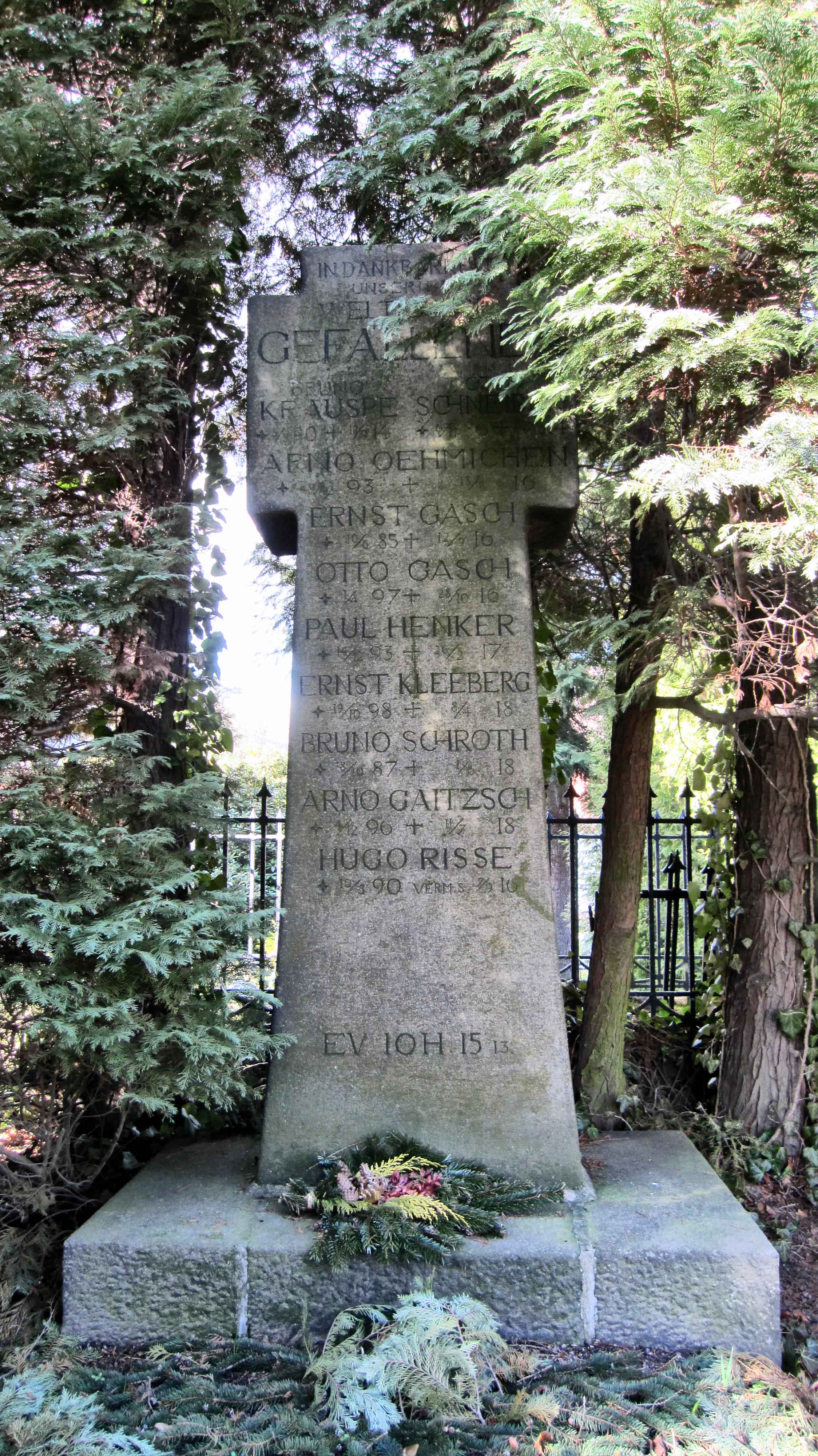 Denkmal für die Gefallenen des 1. Weltkrieges in Collm, Gemeinde Wermsdorf.